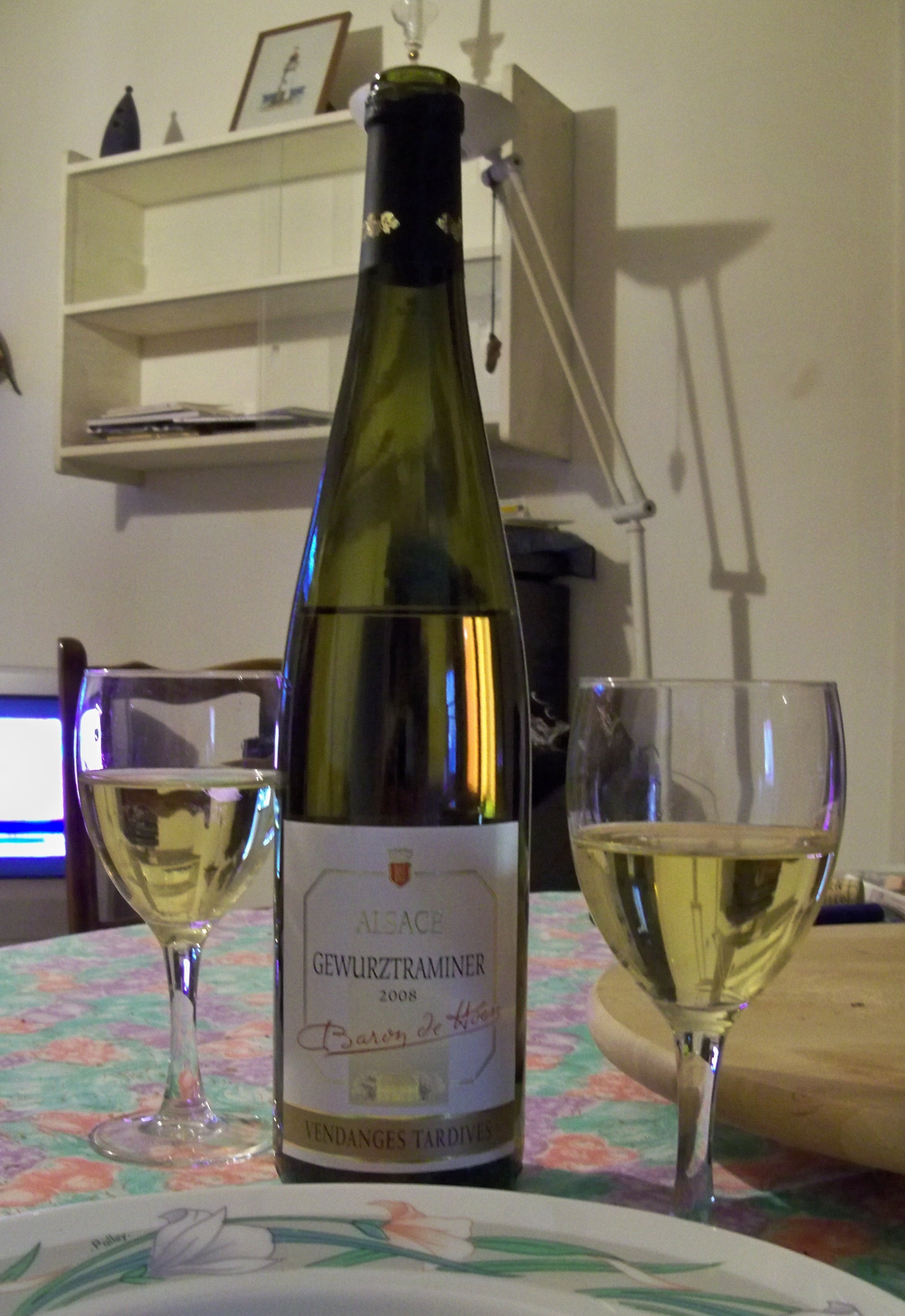 bouteille de Gewurztraminer, vandange tardive